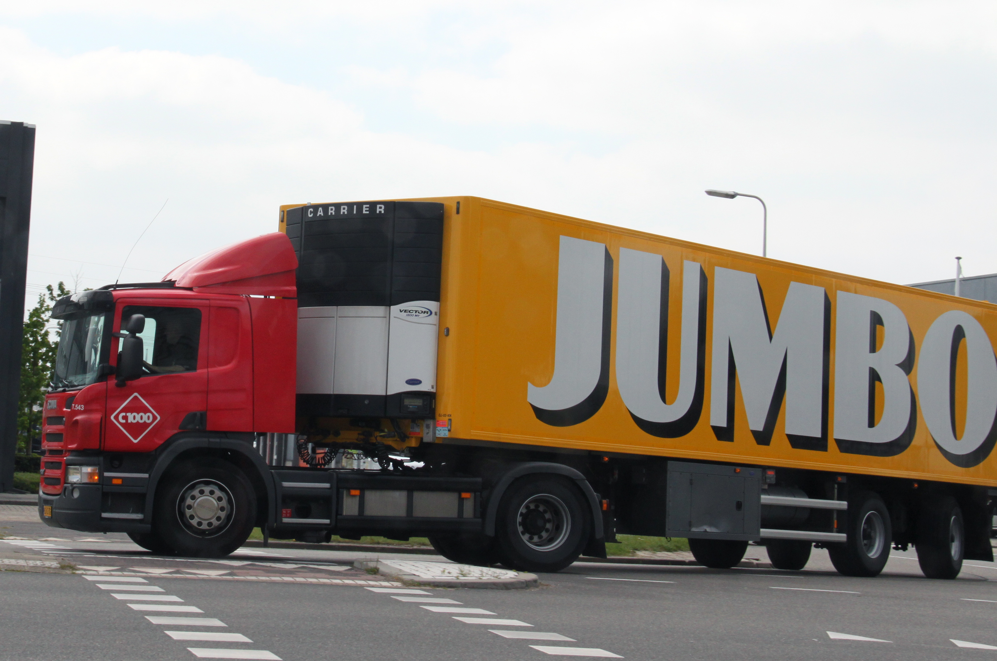 Een vrachtwagen met opdruk van C1000 met een oplegger van Jumbo Supermarkten.